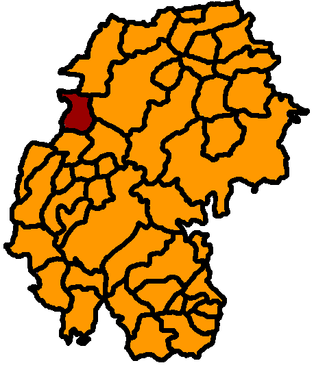 Gossel hervorgehoben, Ilm-Kreis